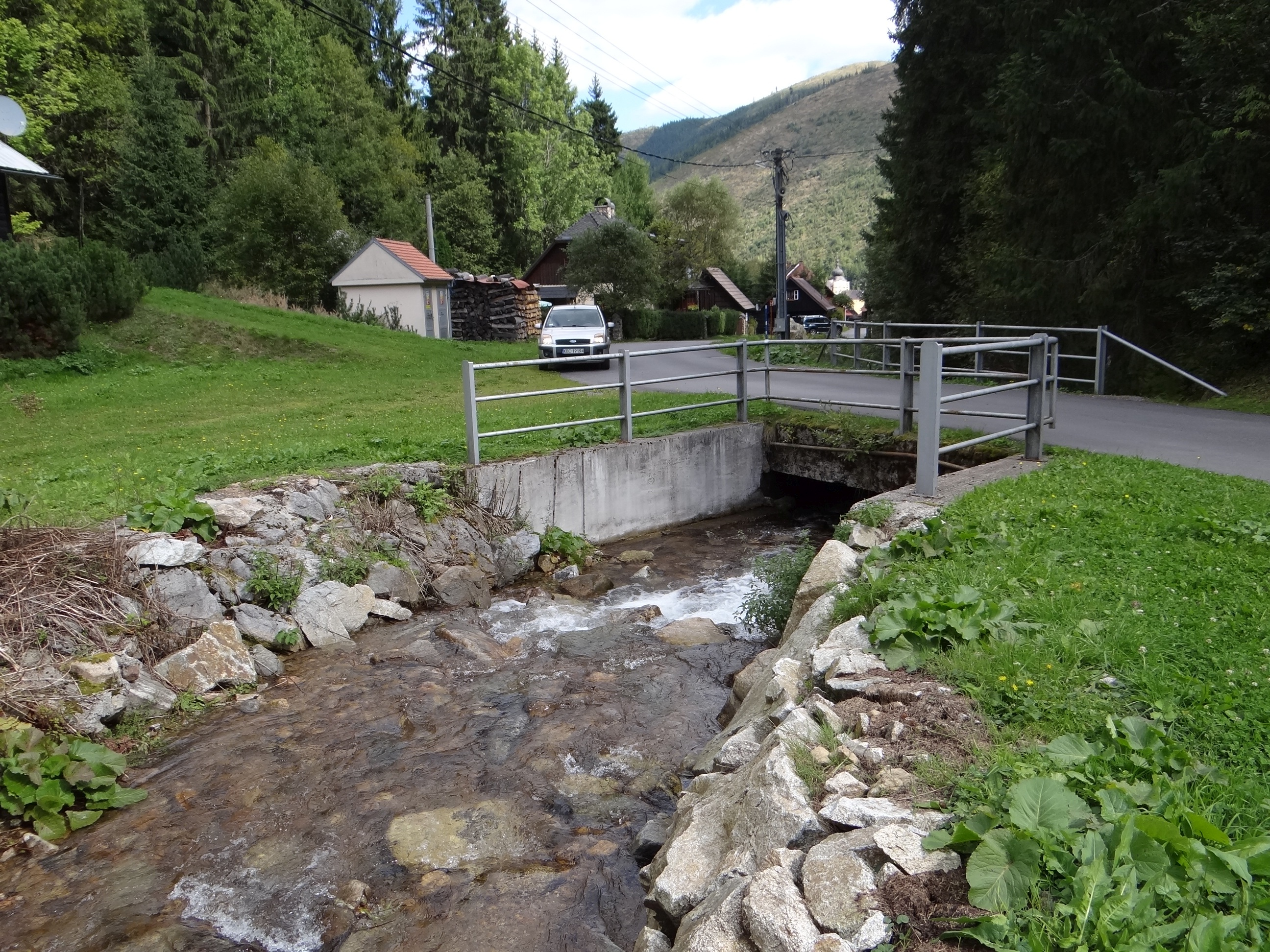 Vyšná Boca